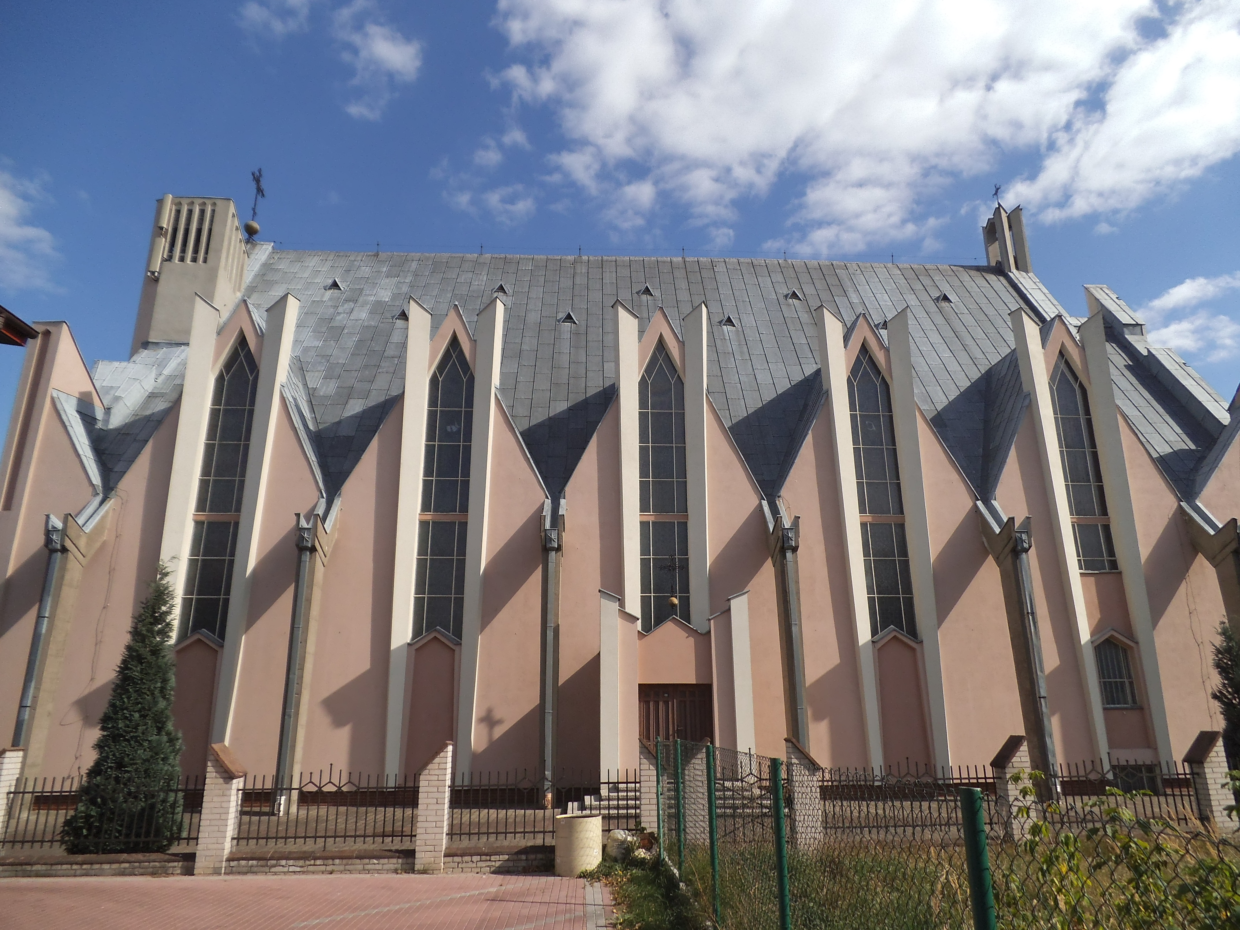 Kościół Niepokalanego Poczęcia NMP w Toruniu